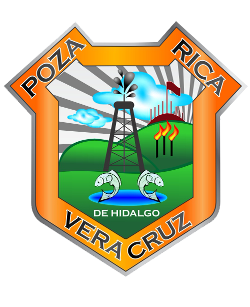 Nueva Versión del Escudo de la Ciudad de Poza Rica de Hidalgo, Veracruz